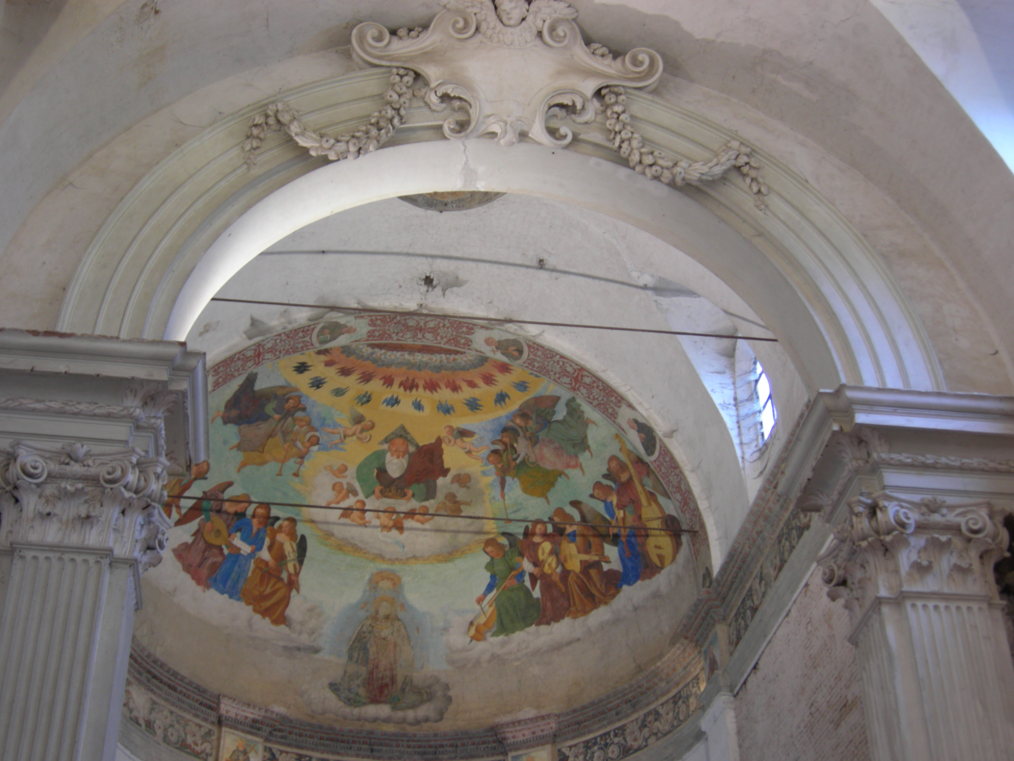 Affresco nell'abside della chiesa di santa Maria della Consolazione a Ferrara.